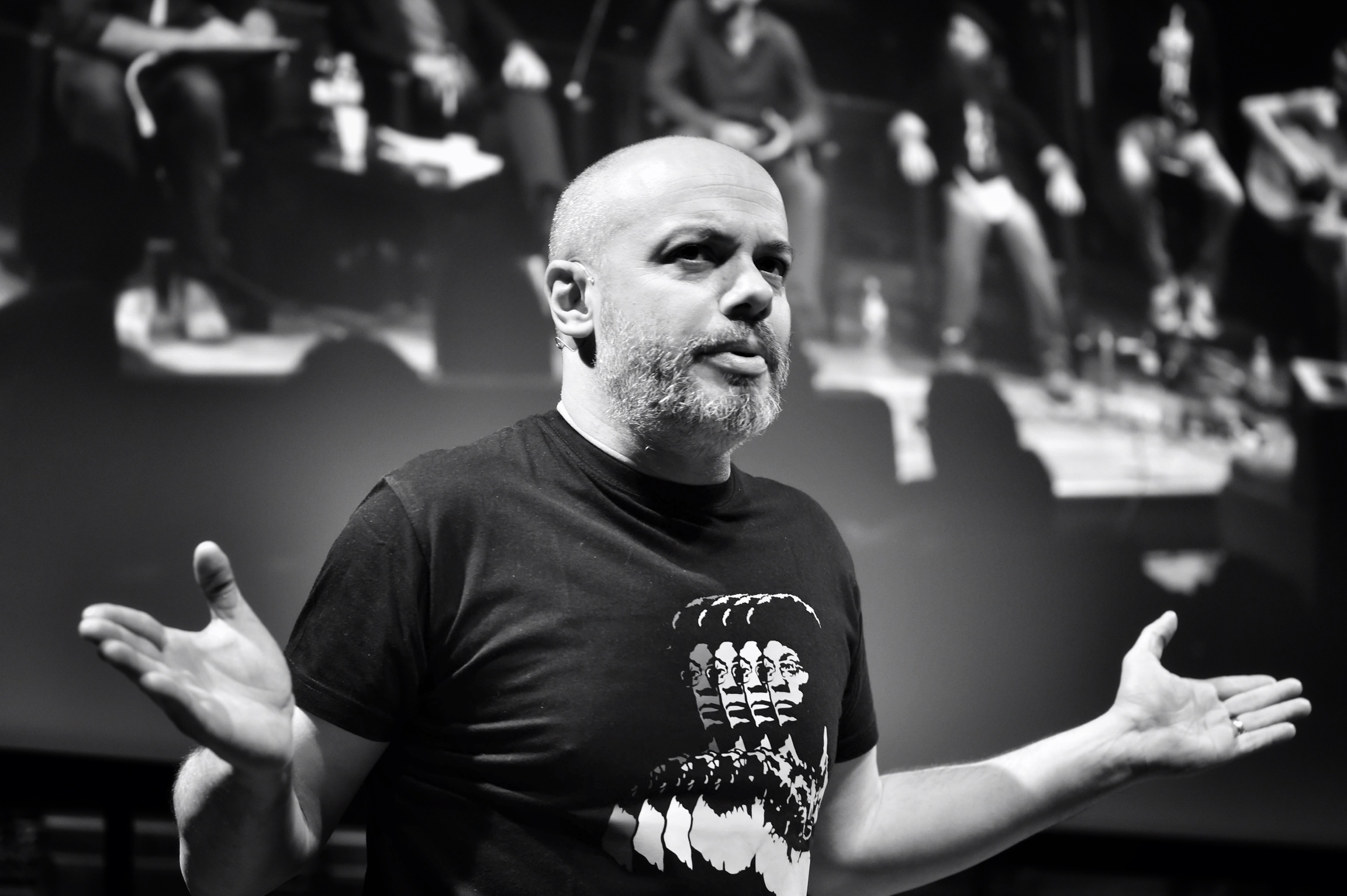 Diego Bianchi protagonista della serata Gazebo live, uno degli eventi che hanno animato l'VIII edizione del Festival Internazionale del Giornalismo di Perugia.